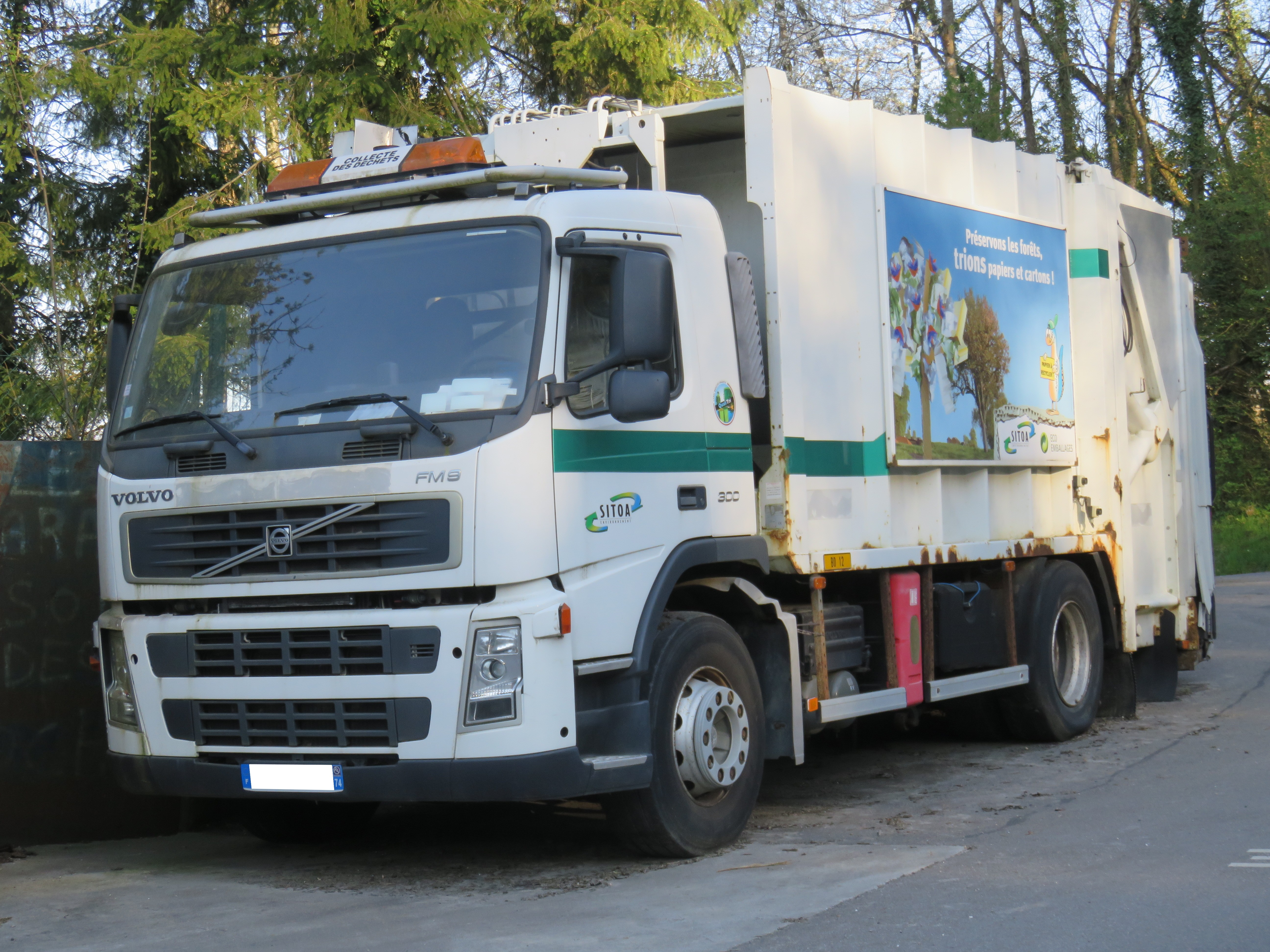 Un SEMAT Cargopac du SITOA (Rumilly, France) le 11 avril 2020.